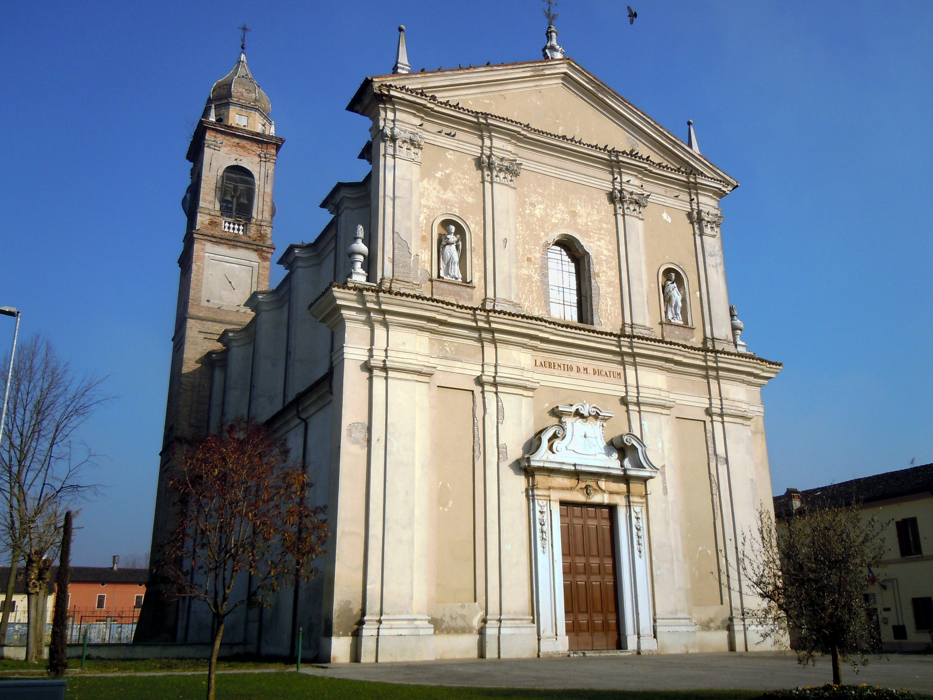 Fiesse, chiesa di S. Lorenzo.